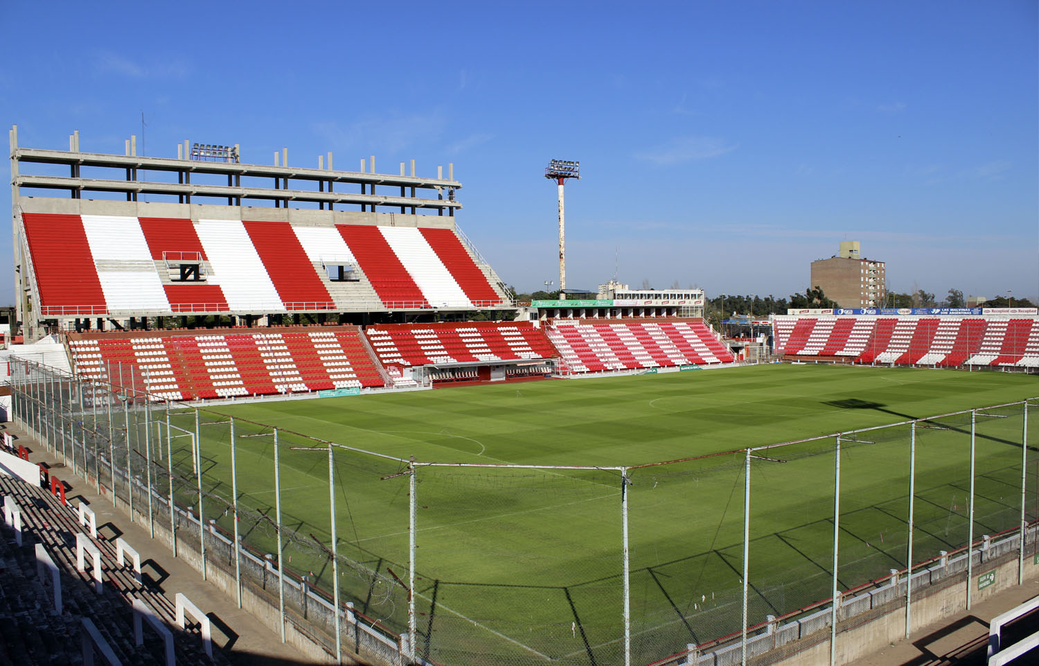 Estadio 15 de Abril - Club Atlético Unión de Santa Fe